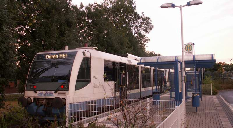 Triebwagen der Rurtalbahn GmbH an der Haltestelle Linnich SIG Combibloc.